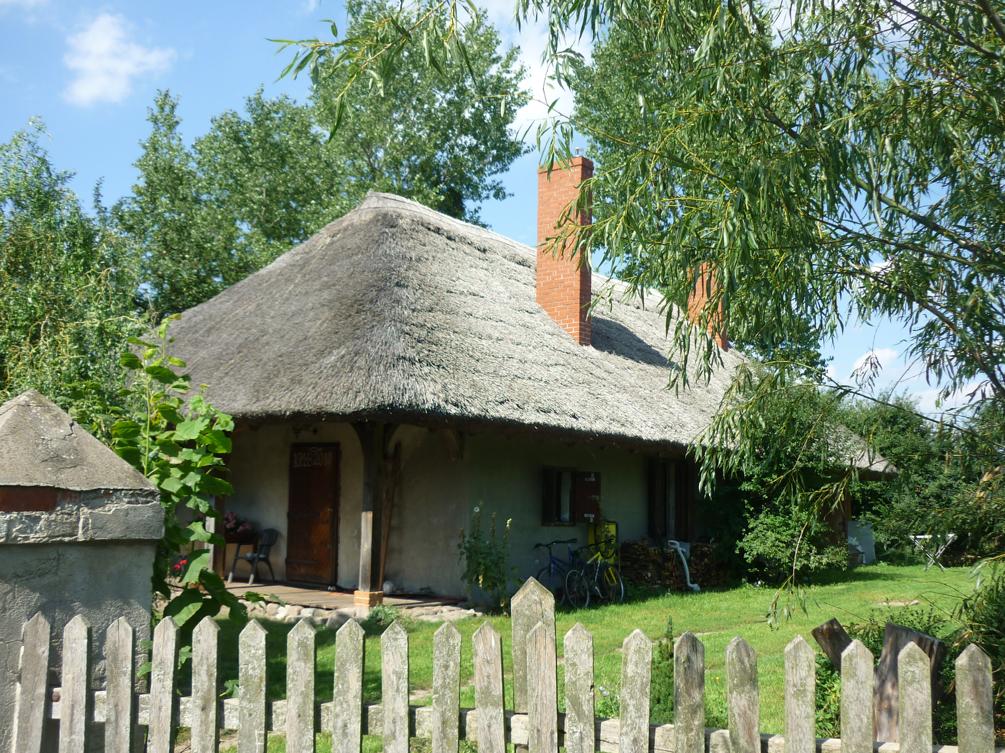 Chata przy drodze do Wierzonki